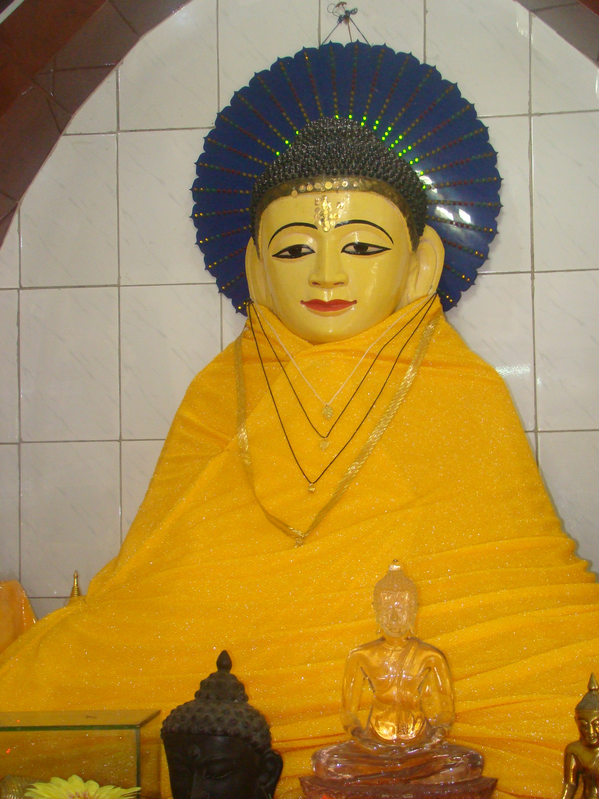 বিহারের বুড়াগোঁসাই মন্দিরে স্থাপিত গৌতম বুদ্ধের মূর্তি